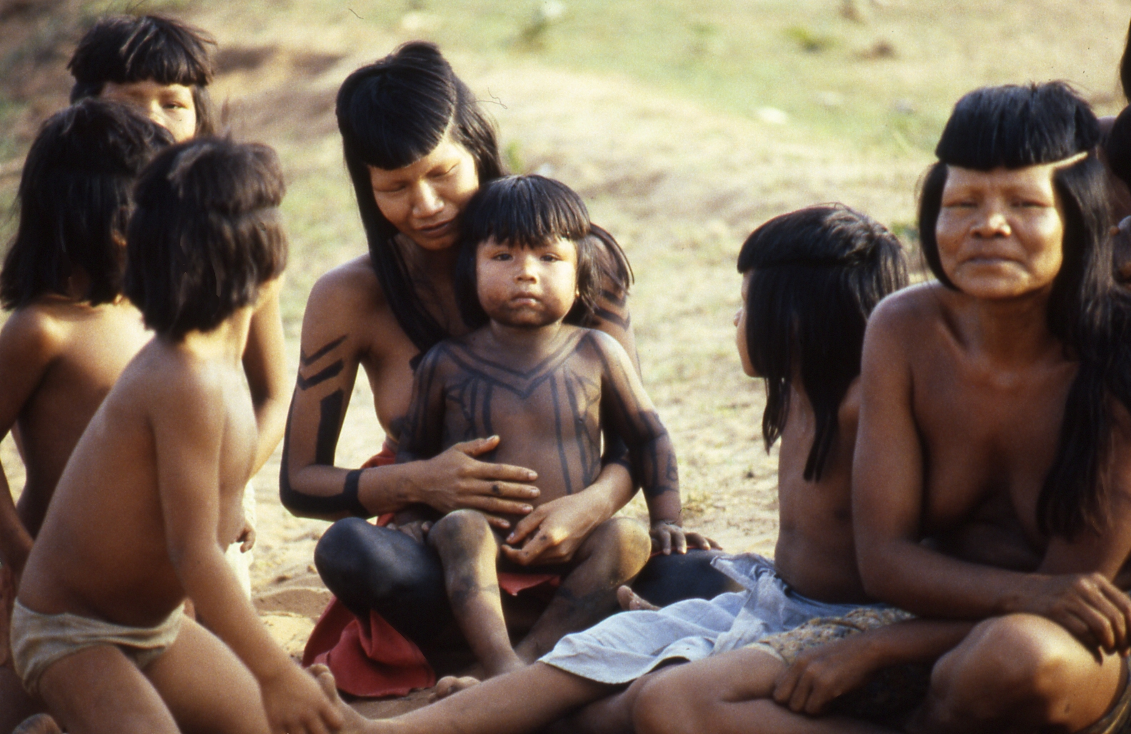 Familienleben